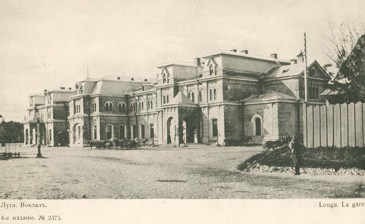 Вокзал Петербурго-Варшавской ж. д. в Луге. Дореволюционная открытка